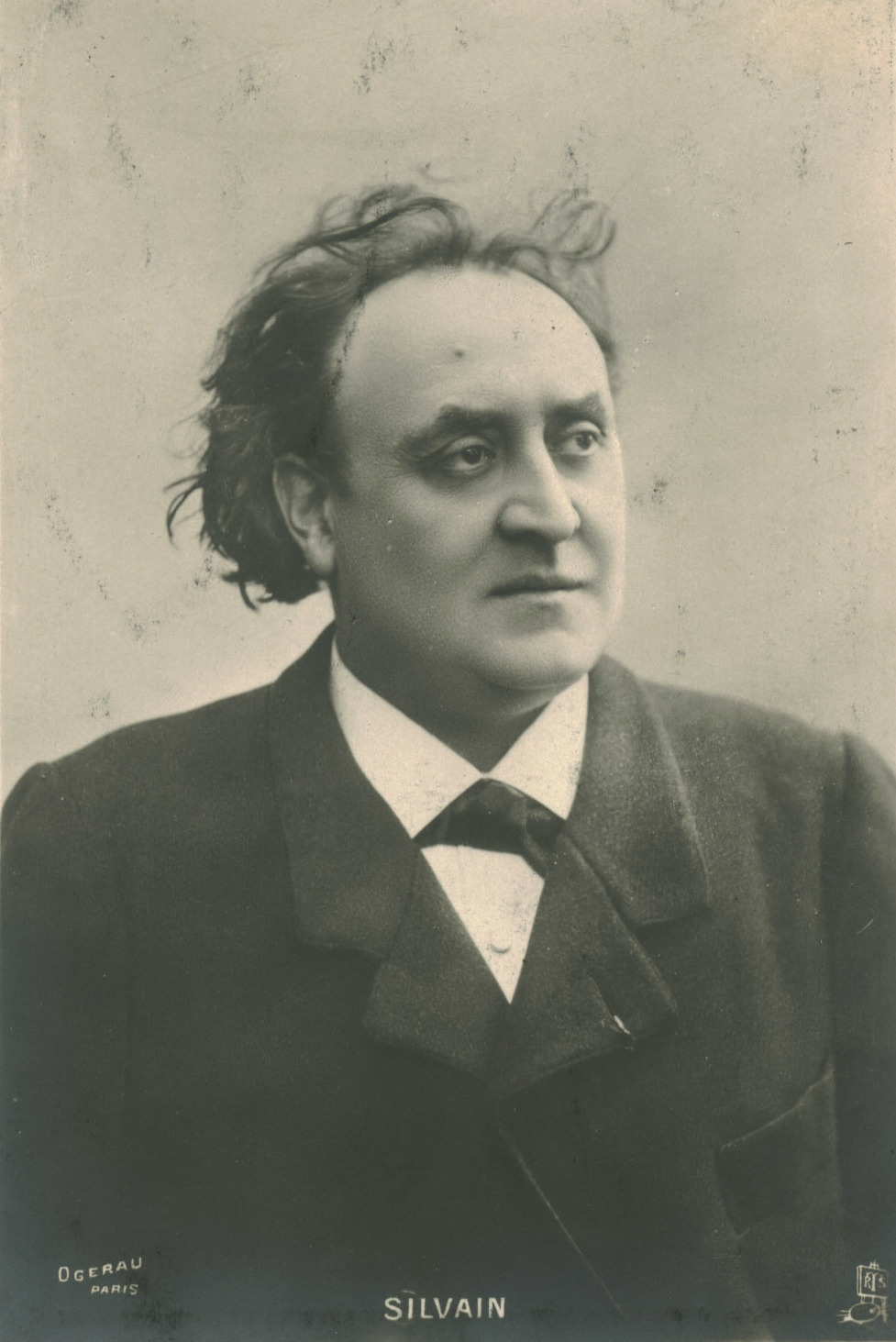 SILVAIN, Eugène_Raphael Tuck (Acteurs célêbres). Photo Ogerau